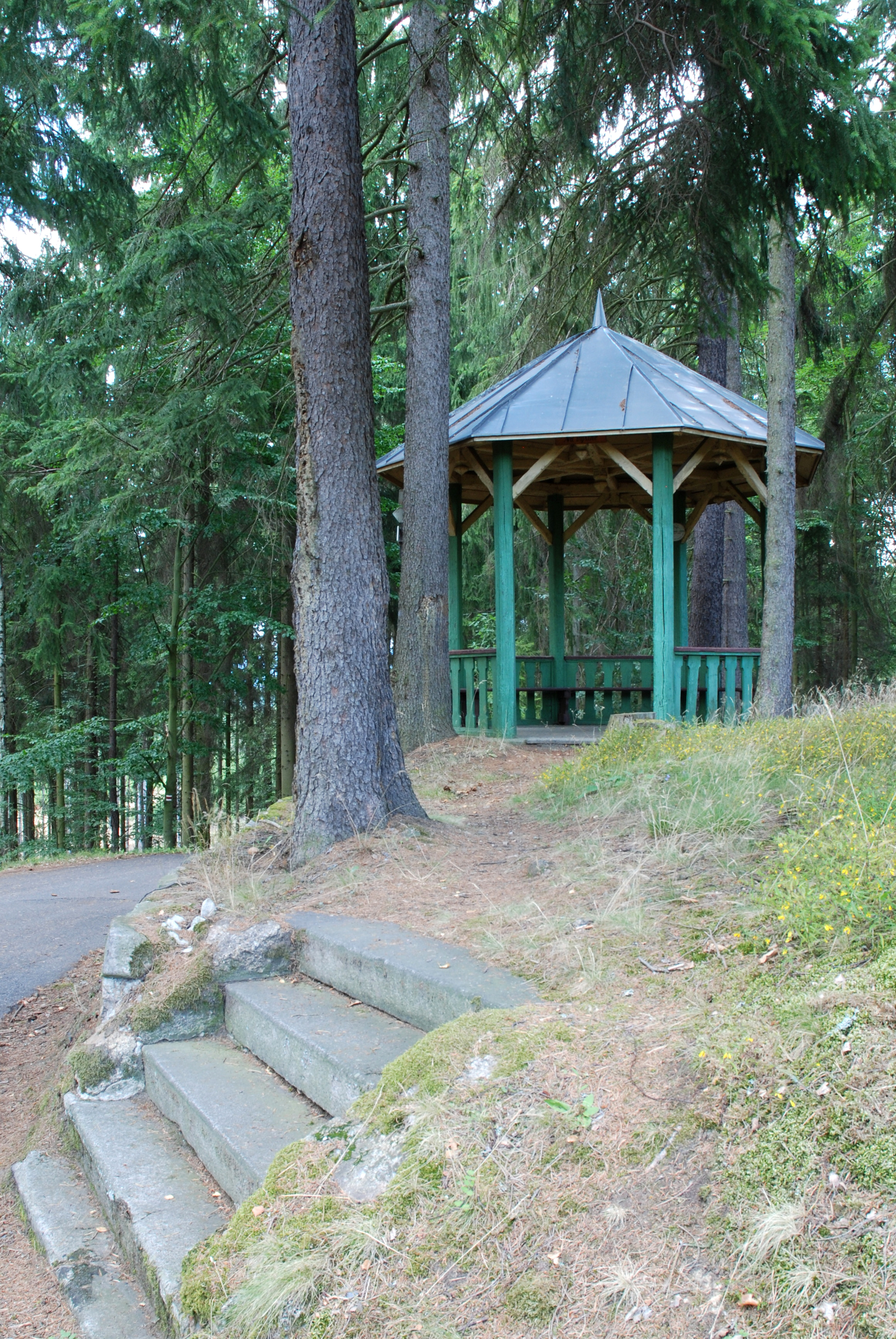 Altán Na Výšině v karlovarských lázeňských lesích nad Okružní cestou